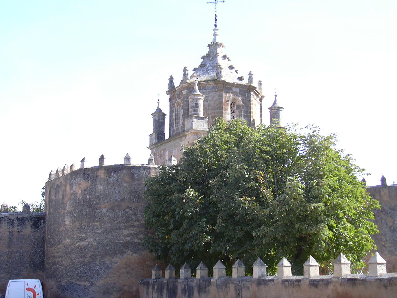 Veruela - Torre del homenaje y murallas